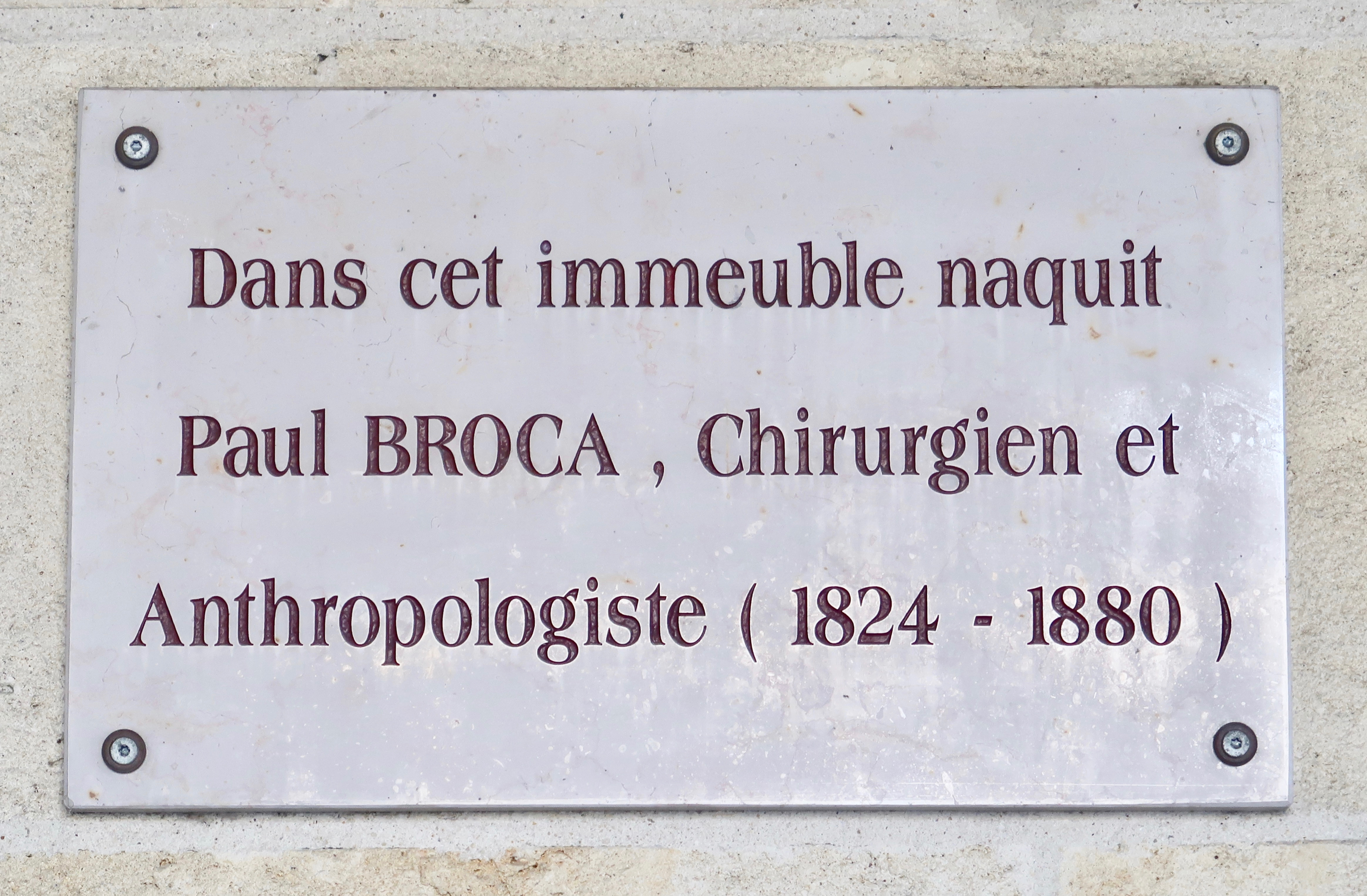 Plaque en hommage à Paul Broca, 21 rue Louis-Pasteur à Sainte-Foy-la-Grande (Gironde), où il est né.